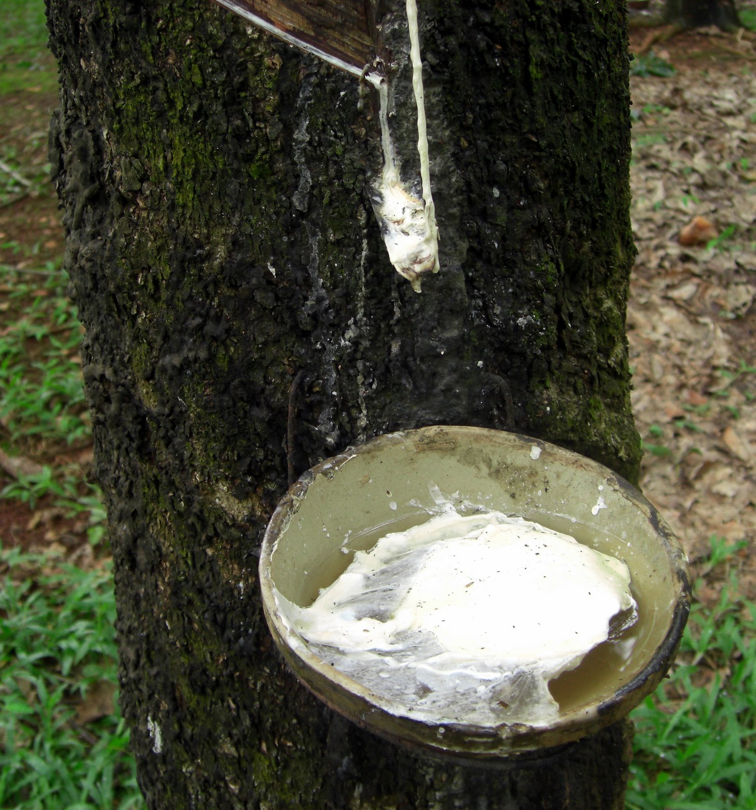 Hevea gum dripping in a cup